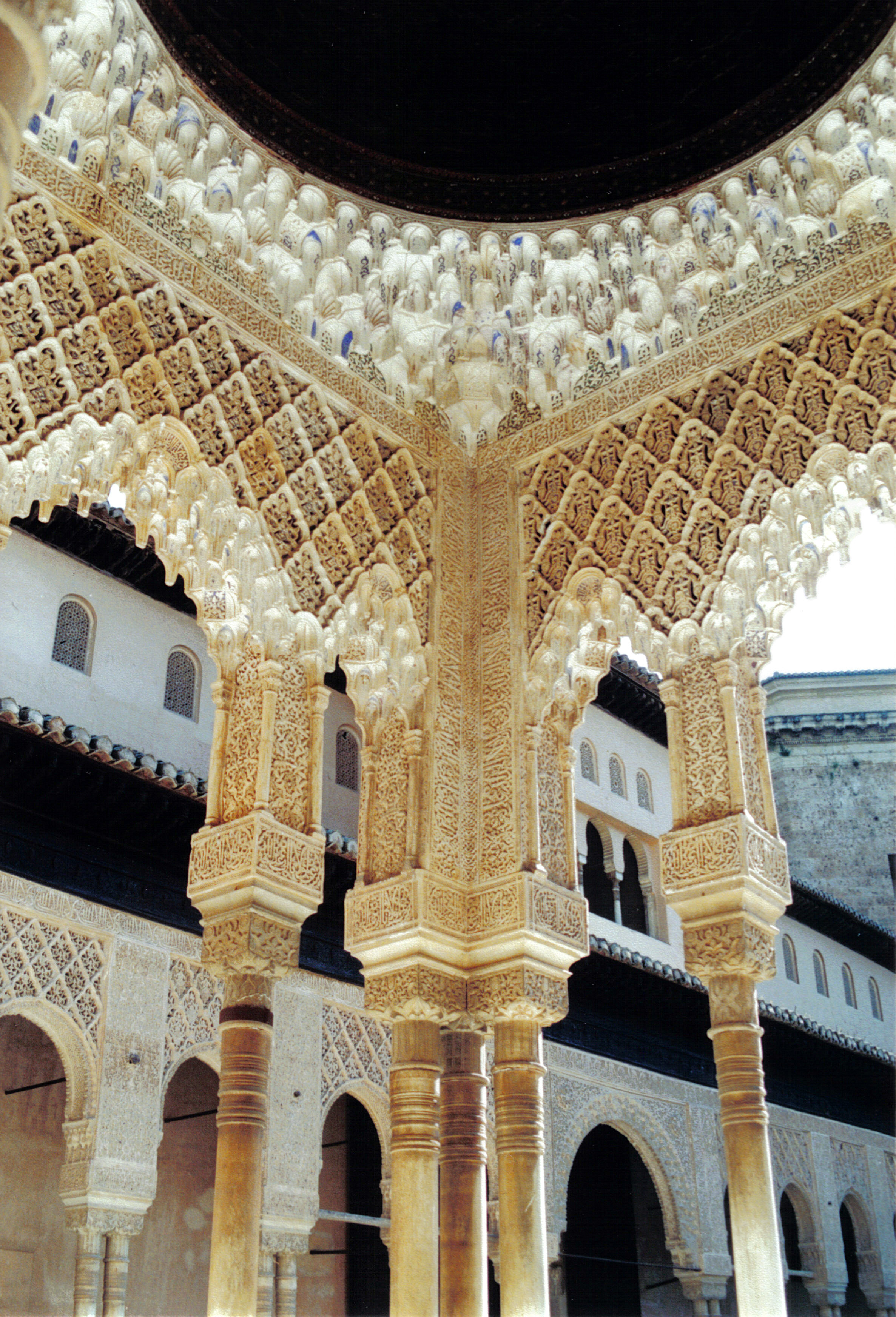 Alhambra de Grenade - Cour des Lions - décors de sebka